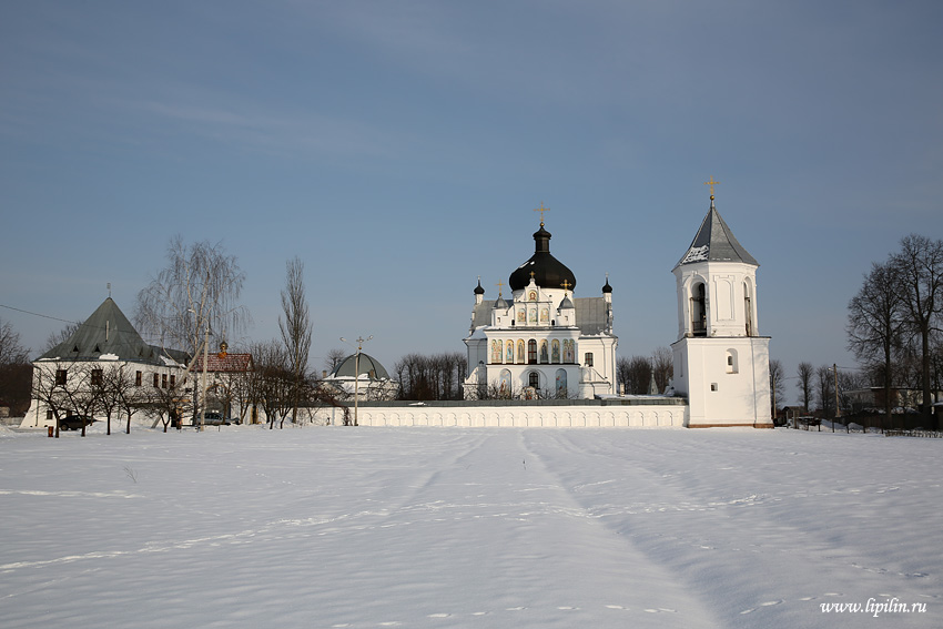 Магілёў. Краявід Свята-Мікольскага манастыра